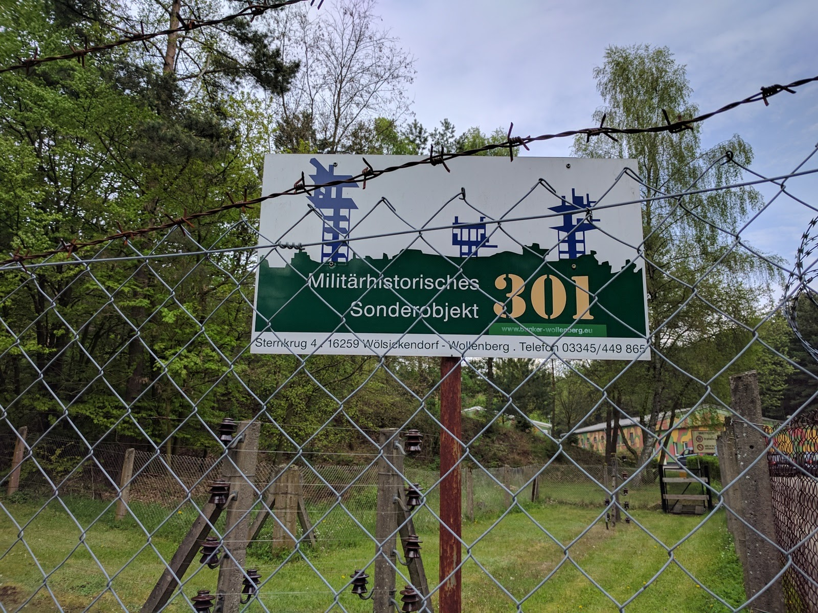 Informationstafel am Eingang des Bunkers.